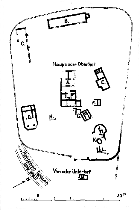 Lageplan der ab 1888 erfolgten Aufgrabung einer alten Burg an der 'flachgeneigten Berglehne' des Uhlenbachthals.